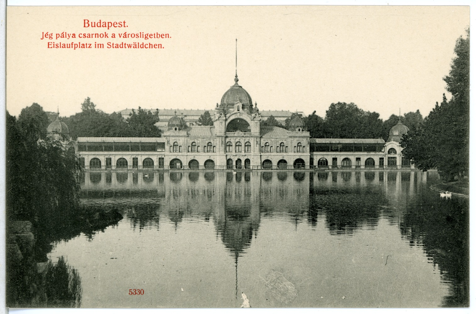 Budapest; Eislaufplatz im Stadtwäldchen This postcard is from publisher Brück & Sohn in Meißen ( This postcard has a unique number 05330 and is available in a higher resolution at the publisher. This images was uploaded in a cooperation project between Wikipedians and the publisher.